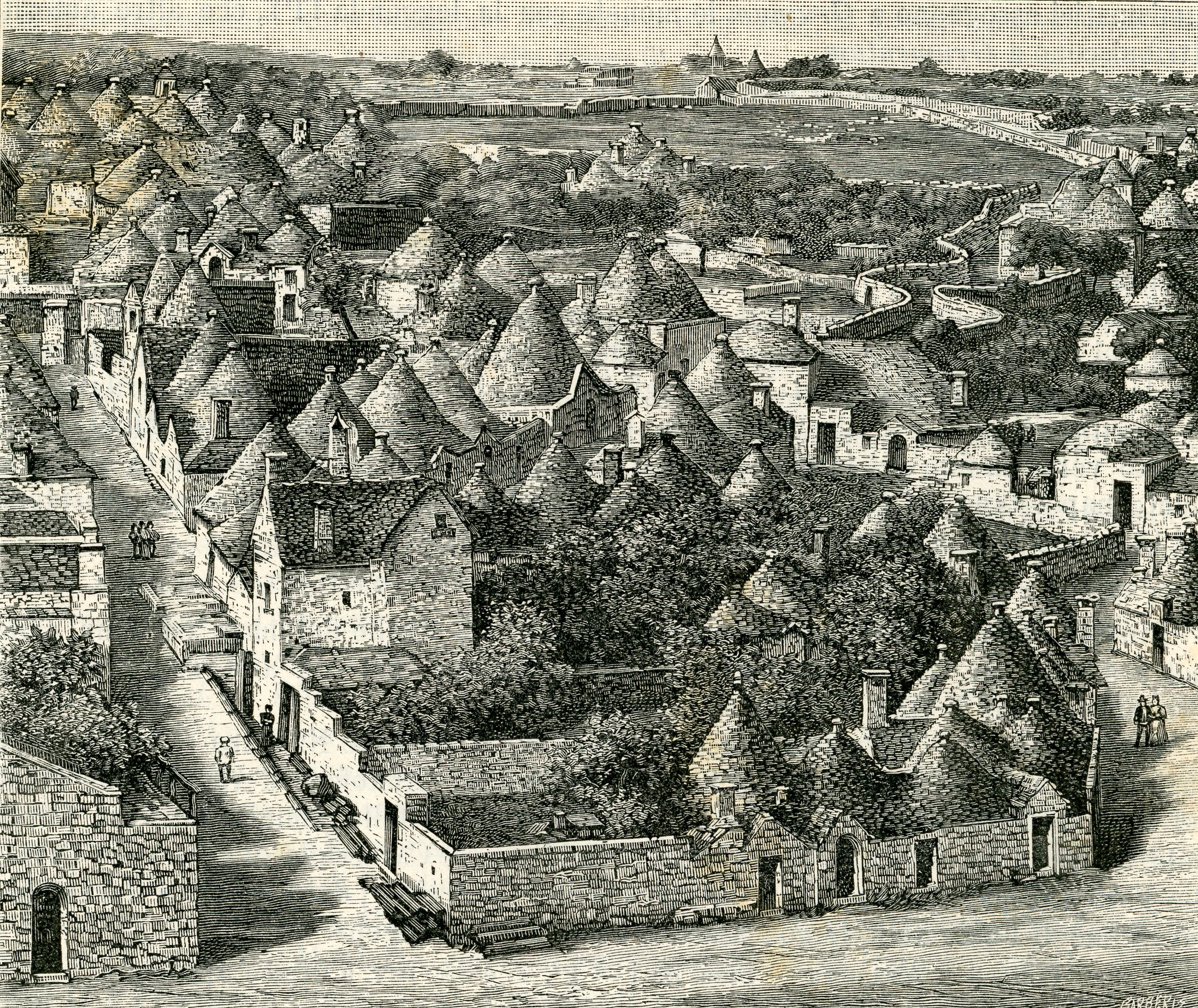 Alberobello: veduta del paese (xilografia di Barberis 1898).